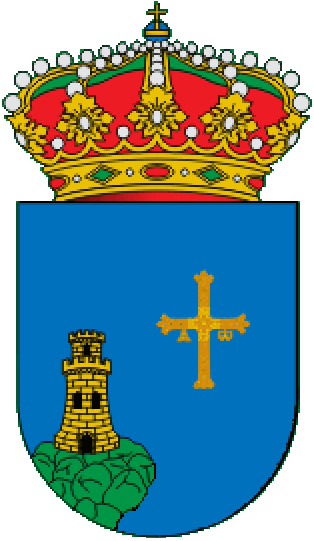 escudo raices